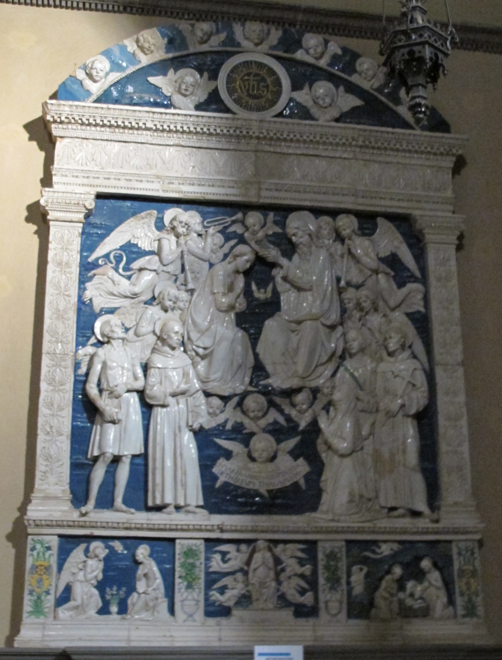 Andrea della robbia, assunta e santi